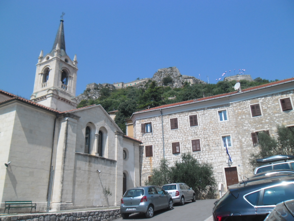 crkva u Kninu